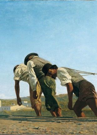 L'alzaia di Telemaco Signorini, è un dettaglio particolare del quadro